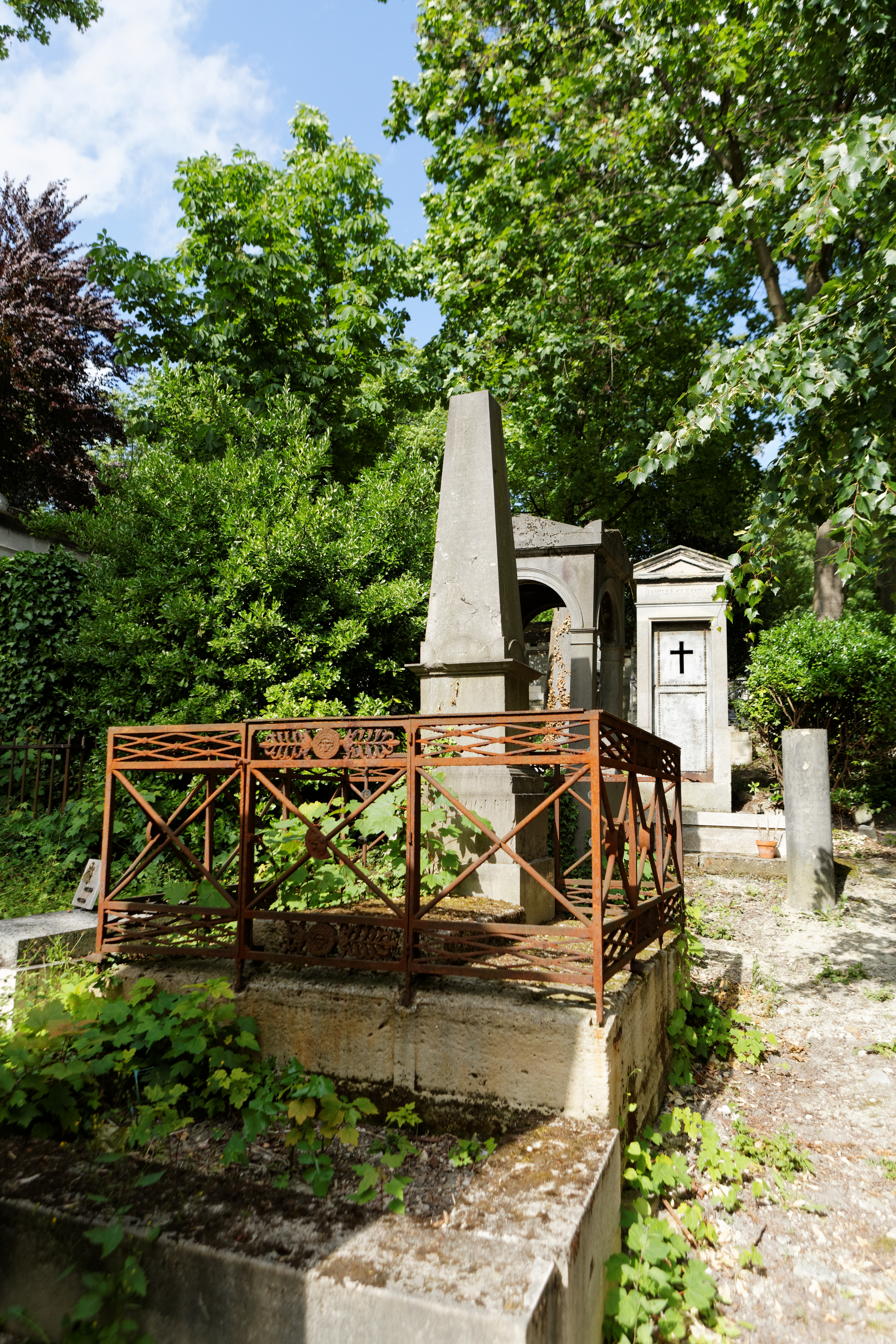 Sépulture de François Roguet (1770-1846), général ; Augustine Nobérasco (1773-1849), son épouse ; Christophe Roguet (1800-1877), leur fils et général ; Anne-Pauline de Ladoucette (1802-1856), son épouse ; Henri Steinkeller (-1866).